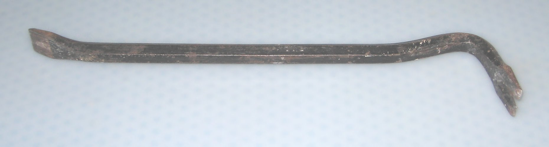 Rompbaskulo La foto estis farita de mi mem.